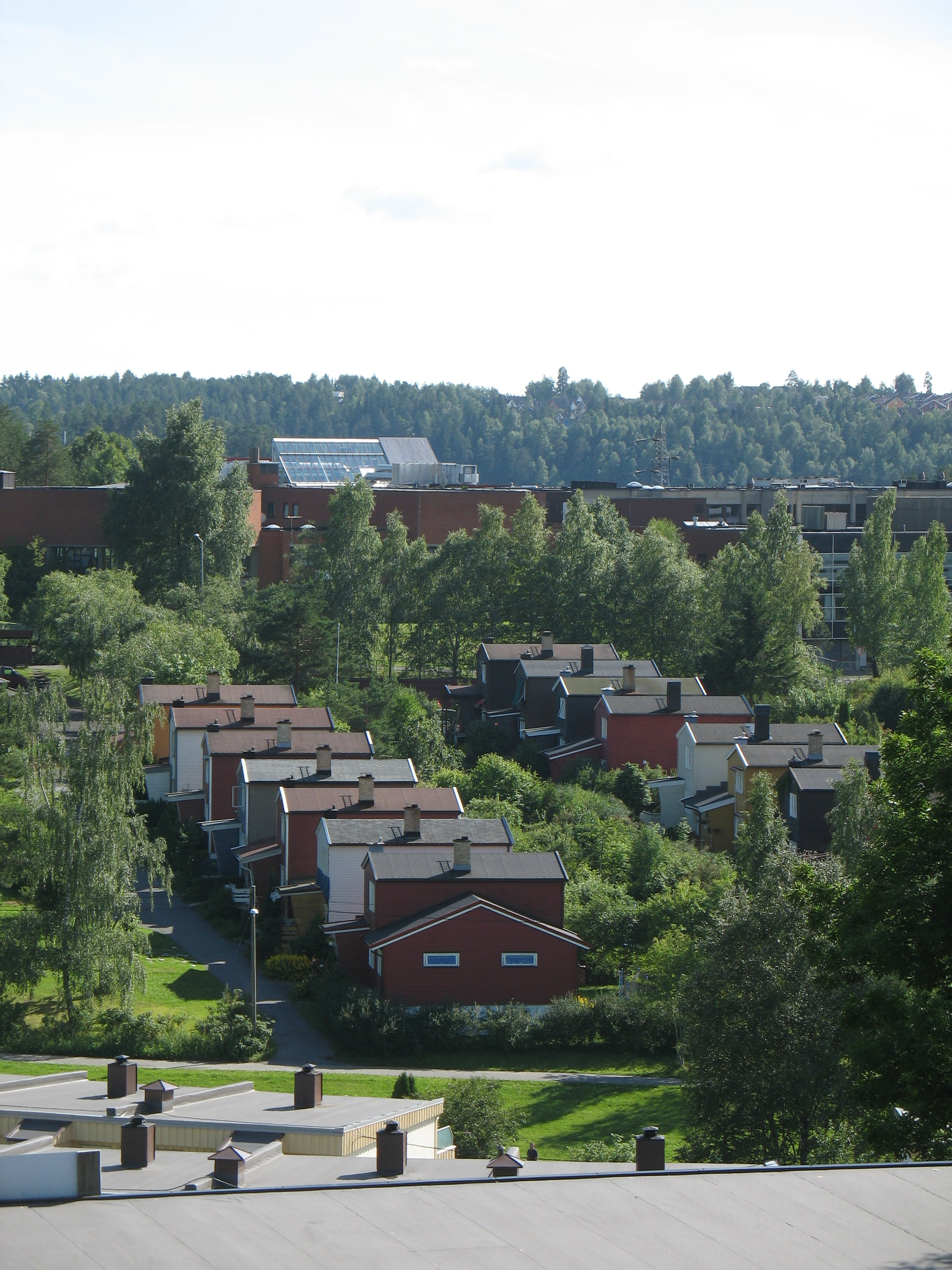 Rekkehusene i Skullerudveien på Skullerud i Oslo. Bildet er tatt like bak Rustad Kjøtt og Dagligvarer, hustakene i forgrunnen er i Welding Olsens vei.